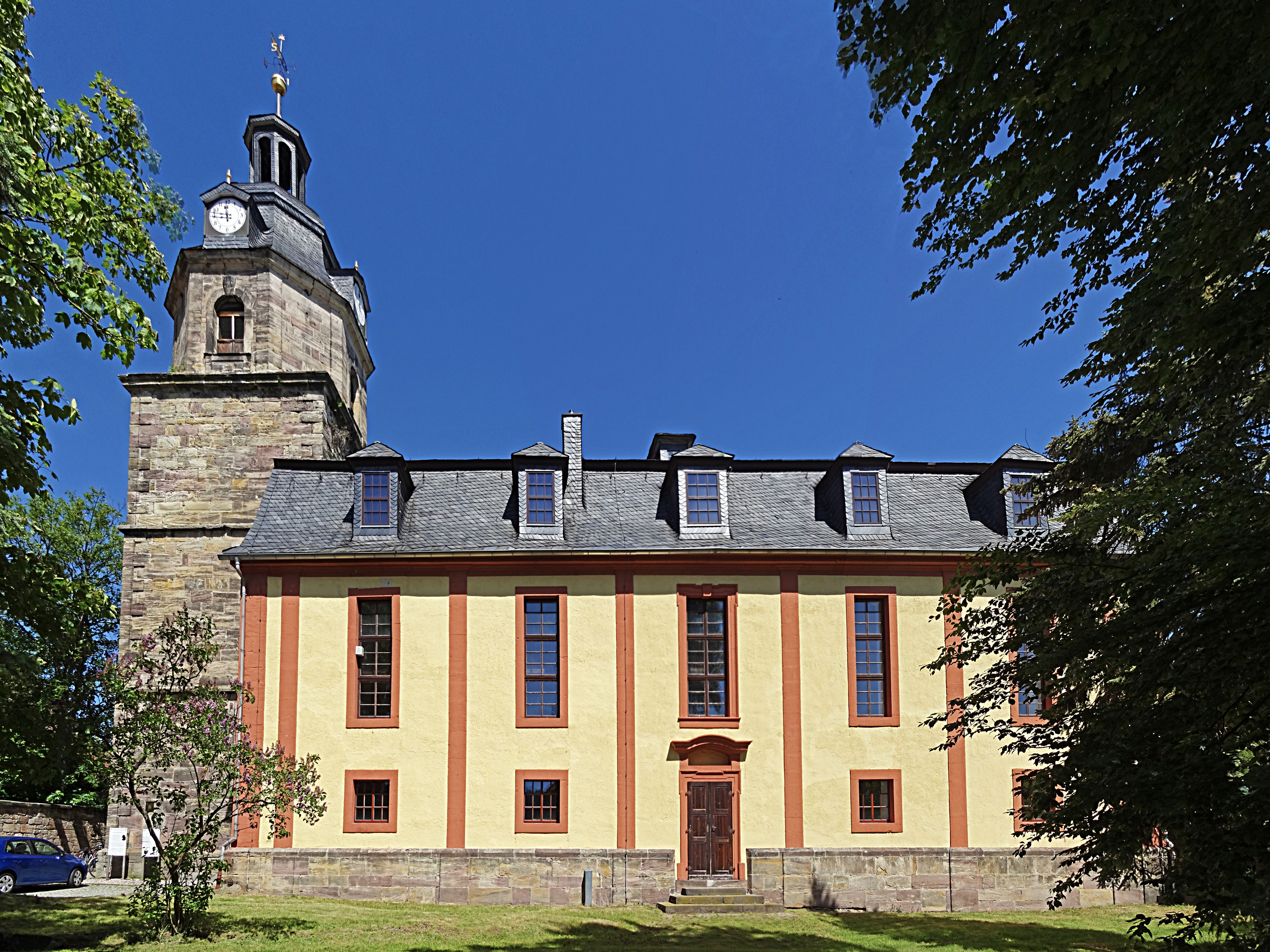 Gräfenroda St. Laurentius von Süden